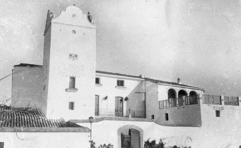 Vista general del Mas Rabasa a Tamarit. Jordi Audet i Viñals (1927-02)